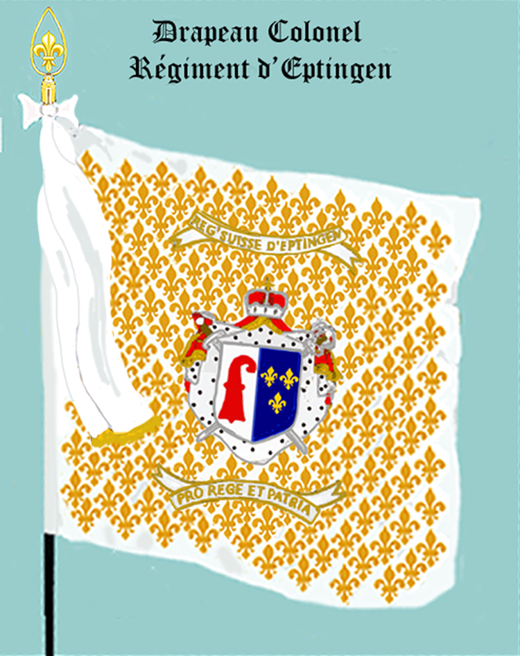 Leibfahen des schweizer Regiment Eptingen. - Entnommen und überarbeitet aus: „LES UNIFORMES ET LES DRAPEAUX DE L'ARMÉE DU ROI“ Marseille 1899. - Drapeau Colonel du régiment d'Eptingen (Régiment étranger au service française - Suisse.)